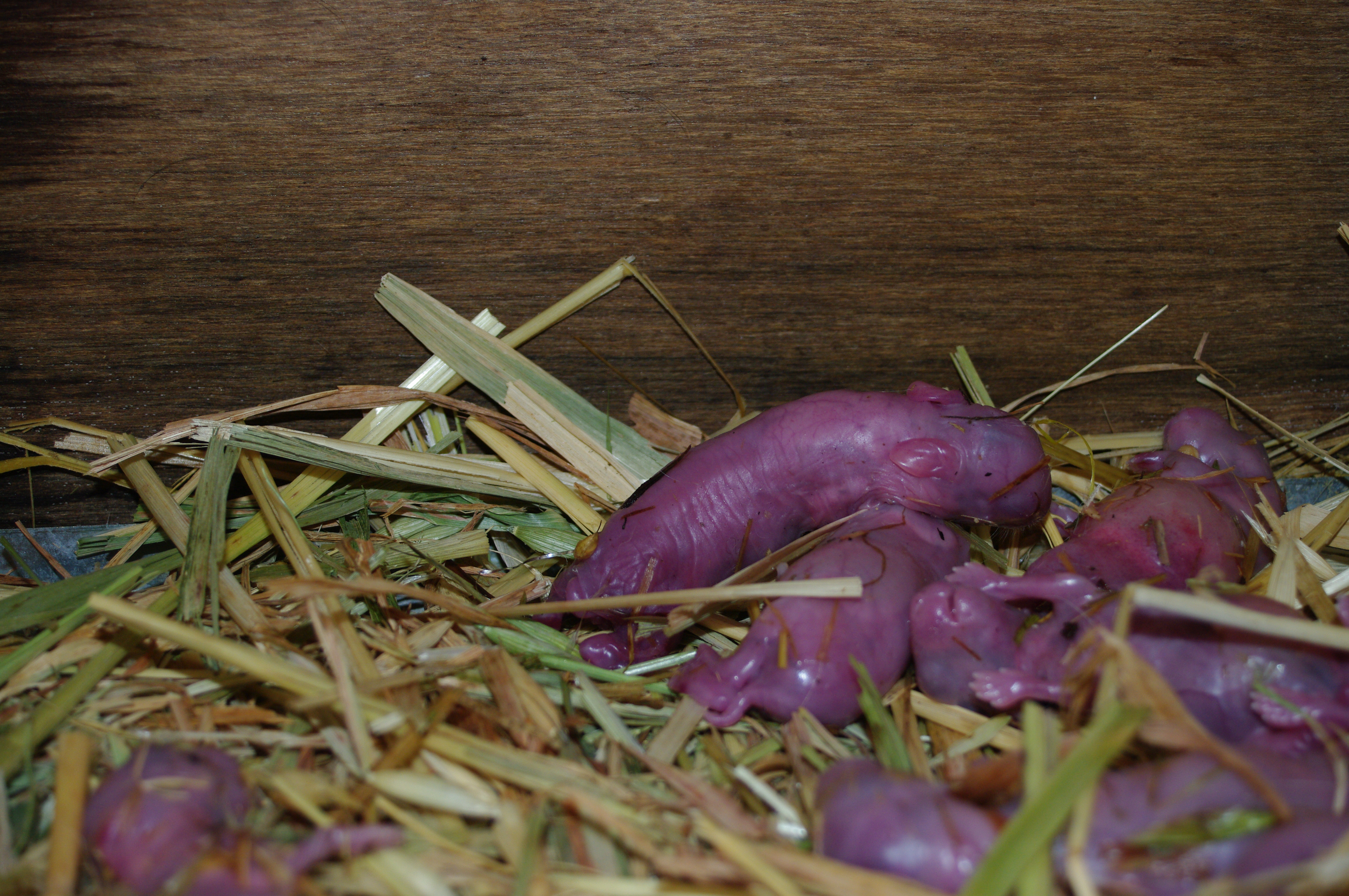 Rabbit kittens 1 hour old